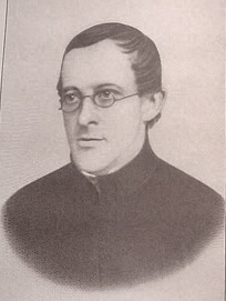 Litho, Pater Adolf von Doß S.J. (1825–1886), Adeliger, Schriftsteller und Komponist